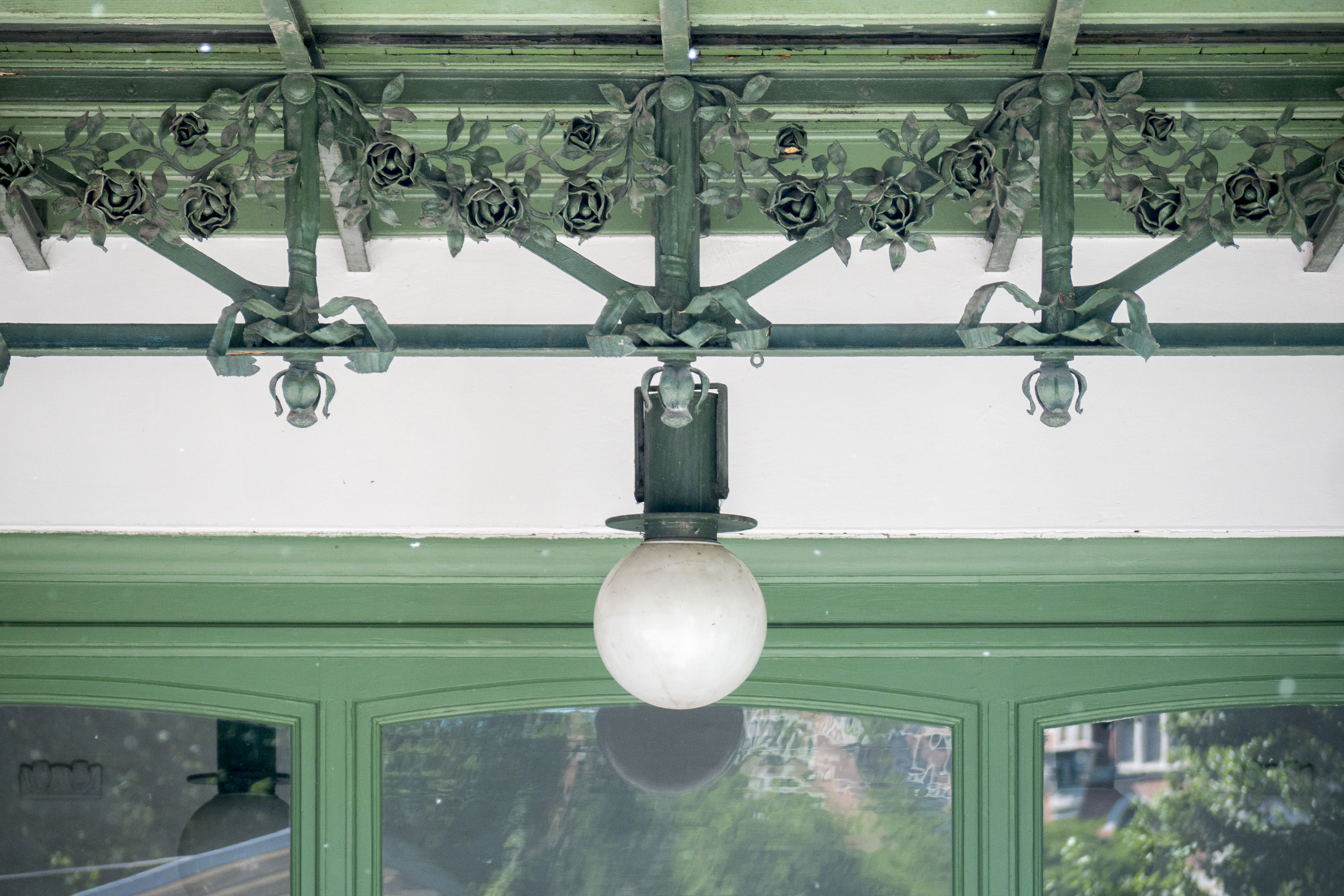 Ubahn Roßauer Lände Rosen